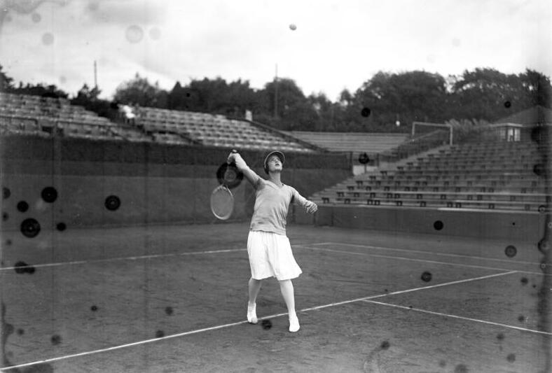 Cilly Aussem, Meisterin der "Blauen Küste" Die deutschen Tennismeisterin Cilly Aussem ist der Star der Riviera-Saison. Sie schlug die englische Meisterin Frau Owen überlegen.